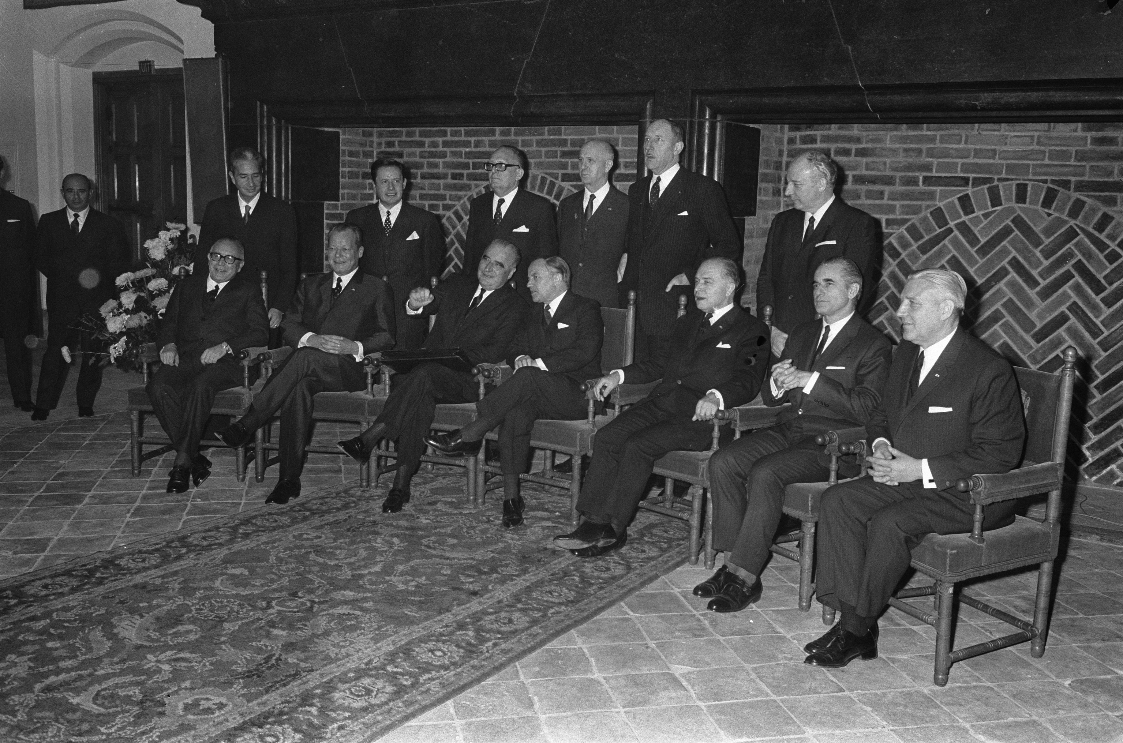 Collectie / Archief : Fotocollectie Anefo Reportage / Serie : [ onbekend ] Beschrijving : EEG-Topconferentie in Den Haag . Opening. Rumor, Brandt, Pompidou, De Jong , Eyskens, Chaban Delm en Werner, Moro, Thorn Datum : 1 december 1969 Locatie : Den Haag, Zuid-Holland Trefwoorden : Openingen, conferenties Persoonsnaam : Brandt, Chaban Delmas, Eyskens, Harmel, Luns, J.A.M.H., Luns, Joseph Fotograaf : Koch, Eric / Anefo Auteursrechthebbende : Nationaal Archief Materiaalsoort : Negatief (zwart/wit) Nummer archiefinventaris : bekijk toegang 2.24.01.05 Bestanddeelnummer : 923-0353